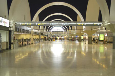 Interior del aeropuerto de Sevilla-San Pablo